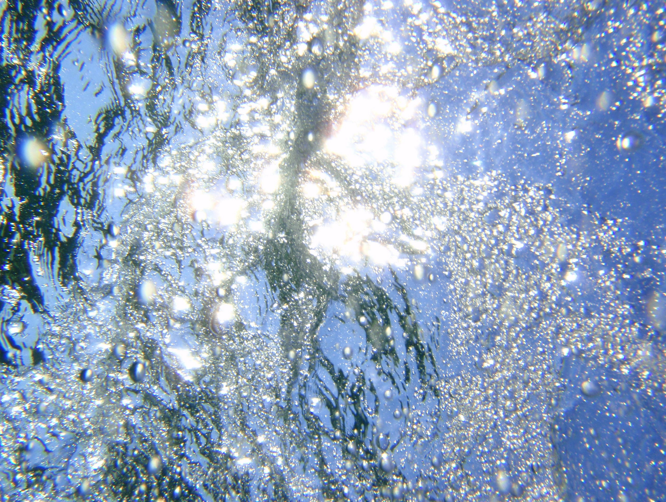 Wasser und Licht 1; eigene Aufnahme des Autors